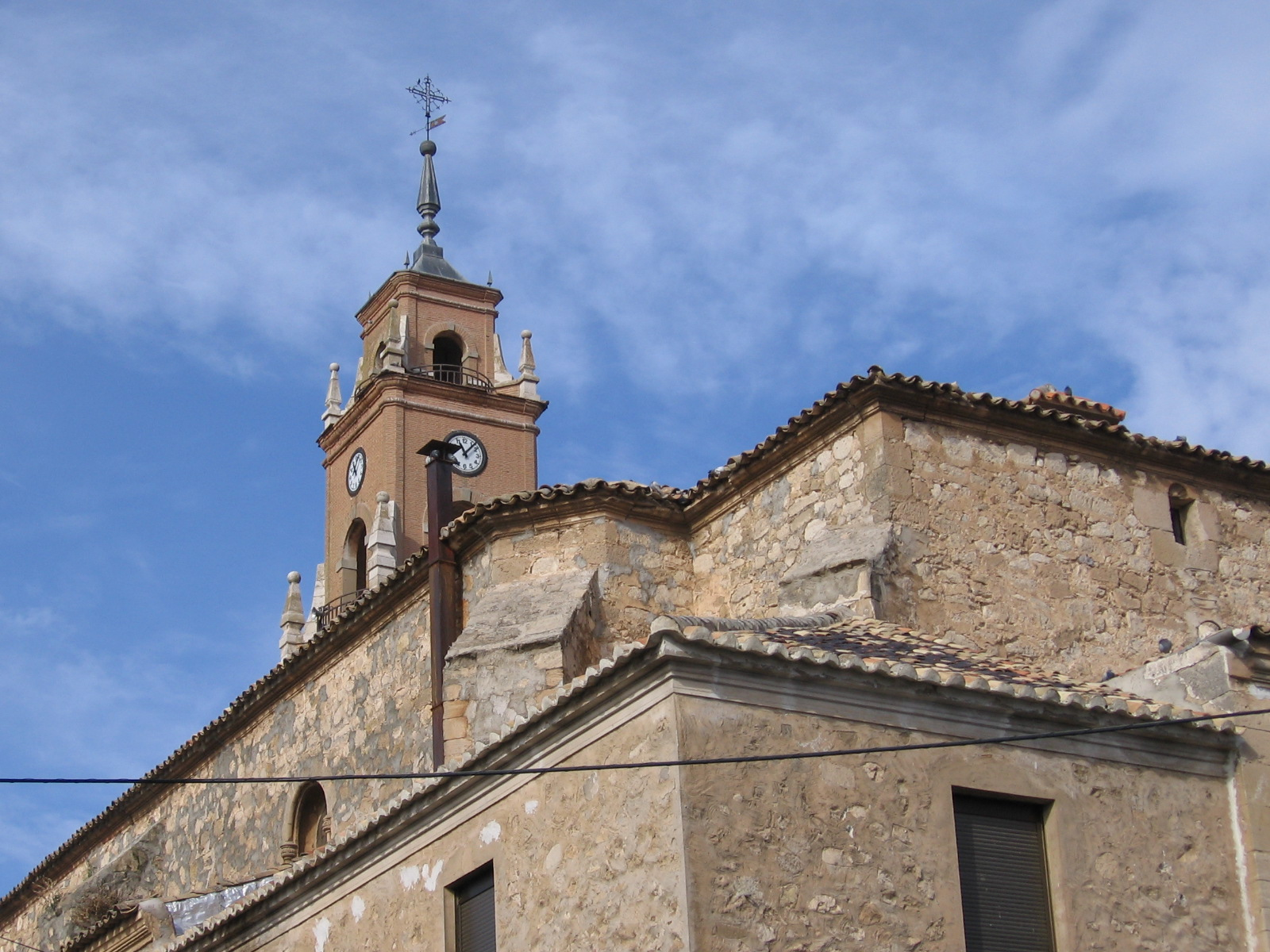 Vista de la iglesia de Villacañas (church)